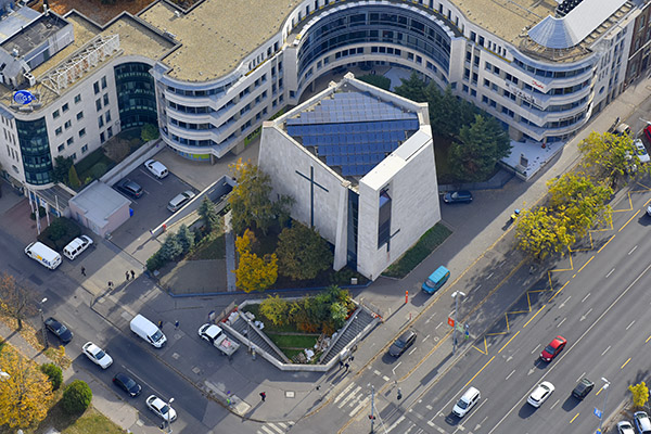 Tours-i Szent Márton és Flüei Szent Miklós-plébániatemplom - légi fotó